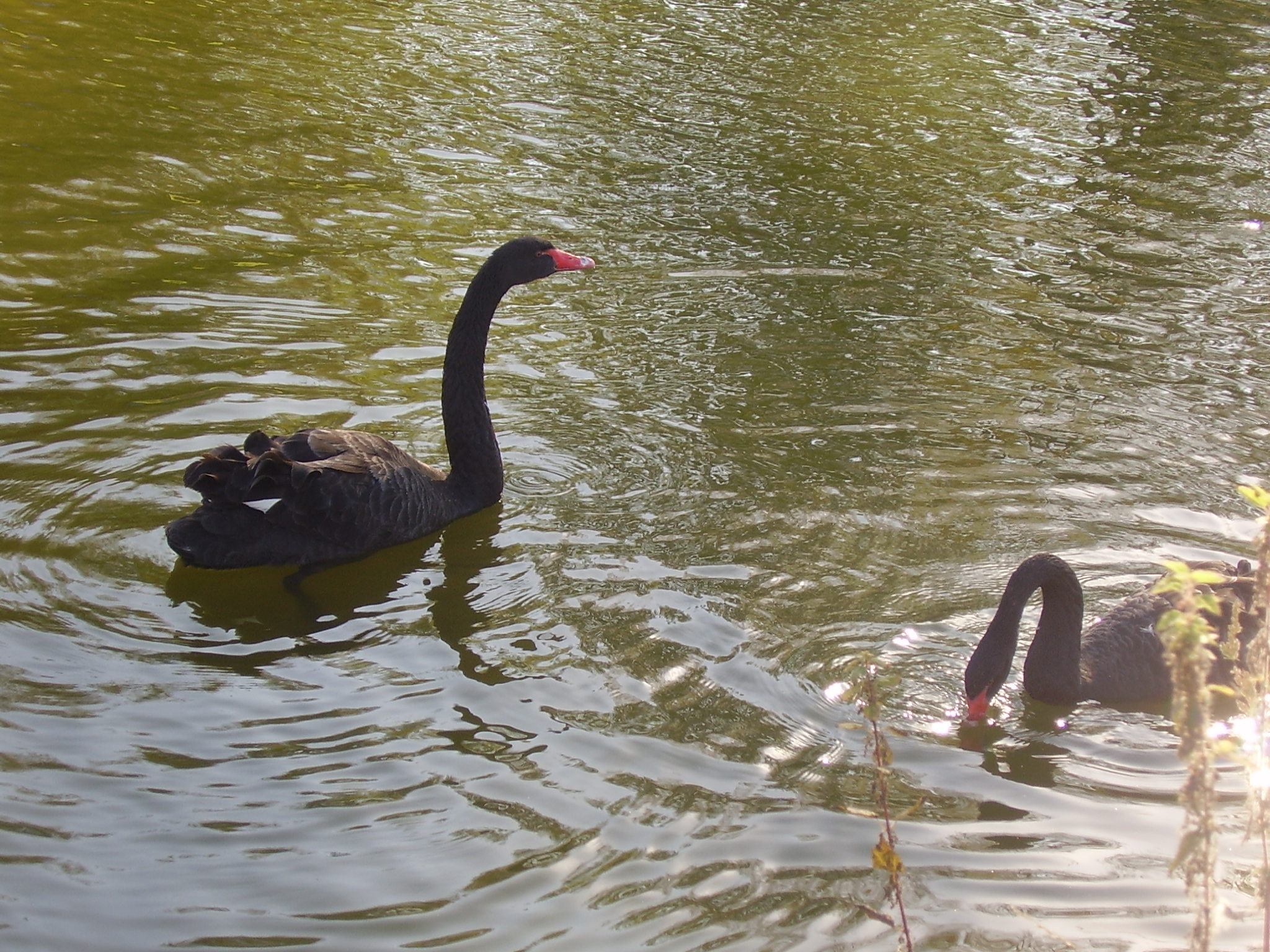 Чёрные лебеди в парке флоры и фауны "Роев ручей" (Красноярск)